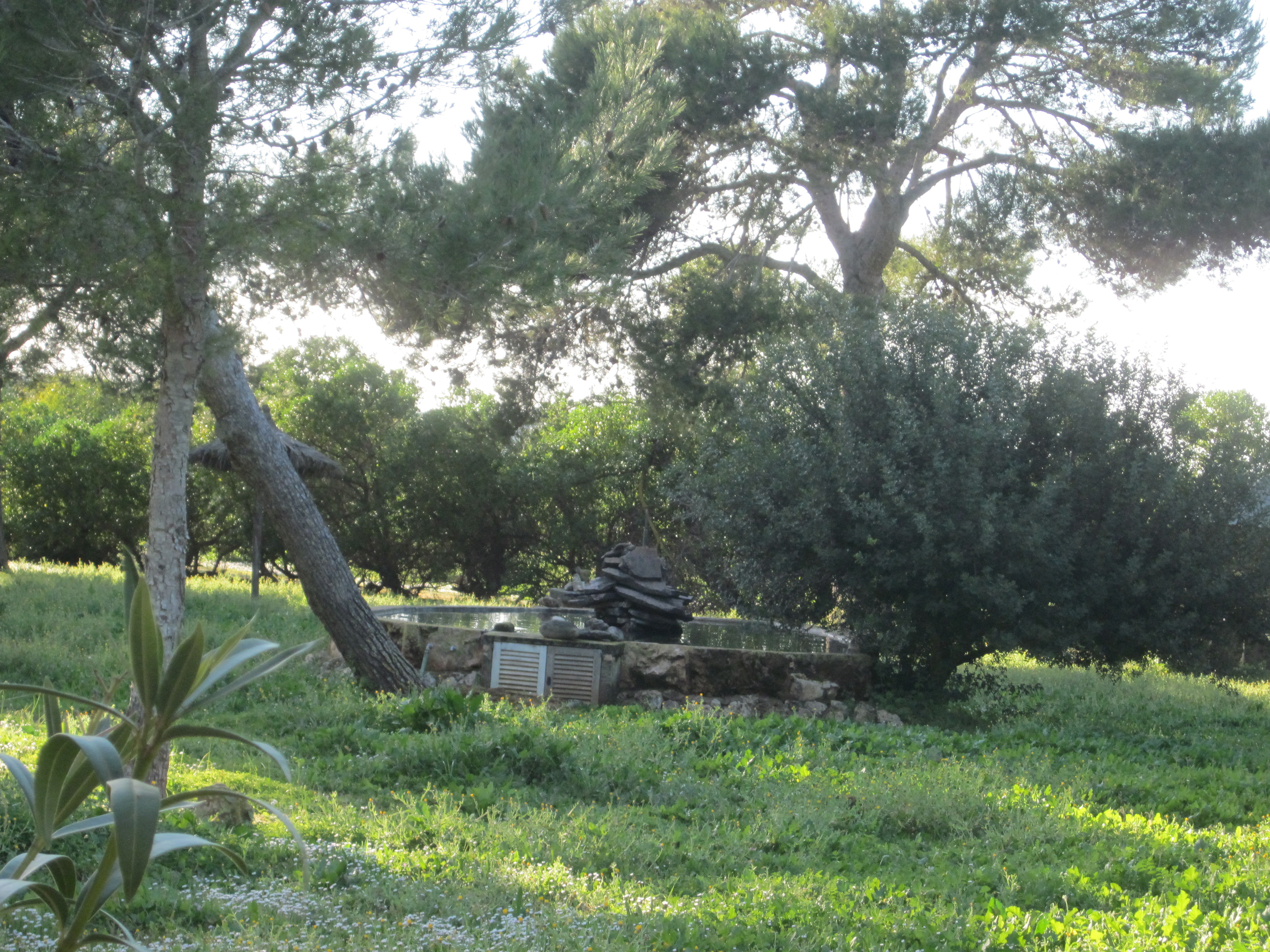 Sant Joan de la Font Santa és un balneari al terme municipal de Campos, Mallorca devora la carretera que va a la Colònia de Sant Jordi, s'utilitza com a hotel i al mateix temps també es fan curacions gràcies a les seves aigües termals